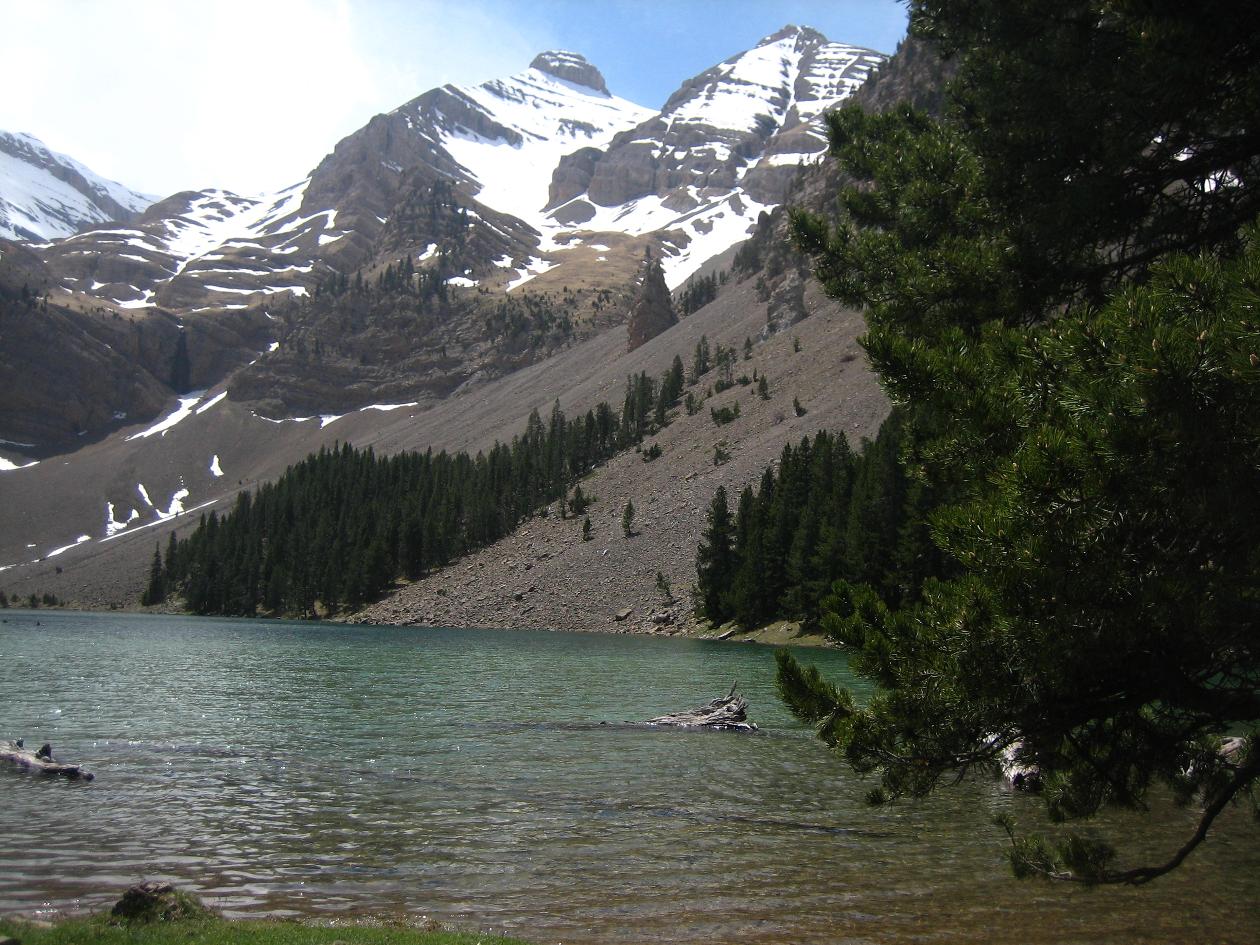 Basa de la mora (Alto Cinca)